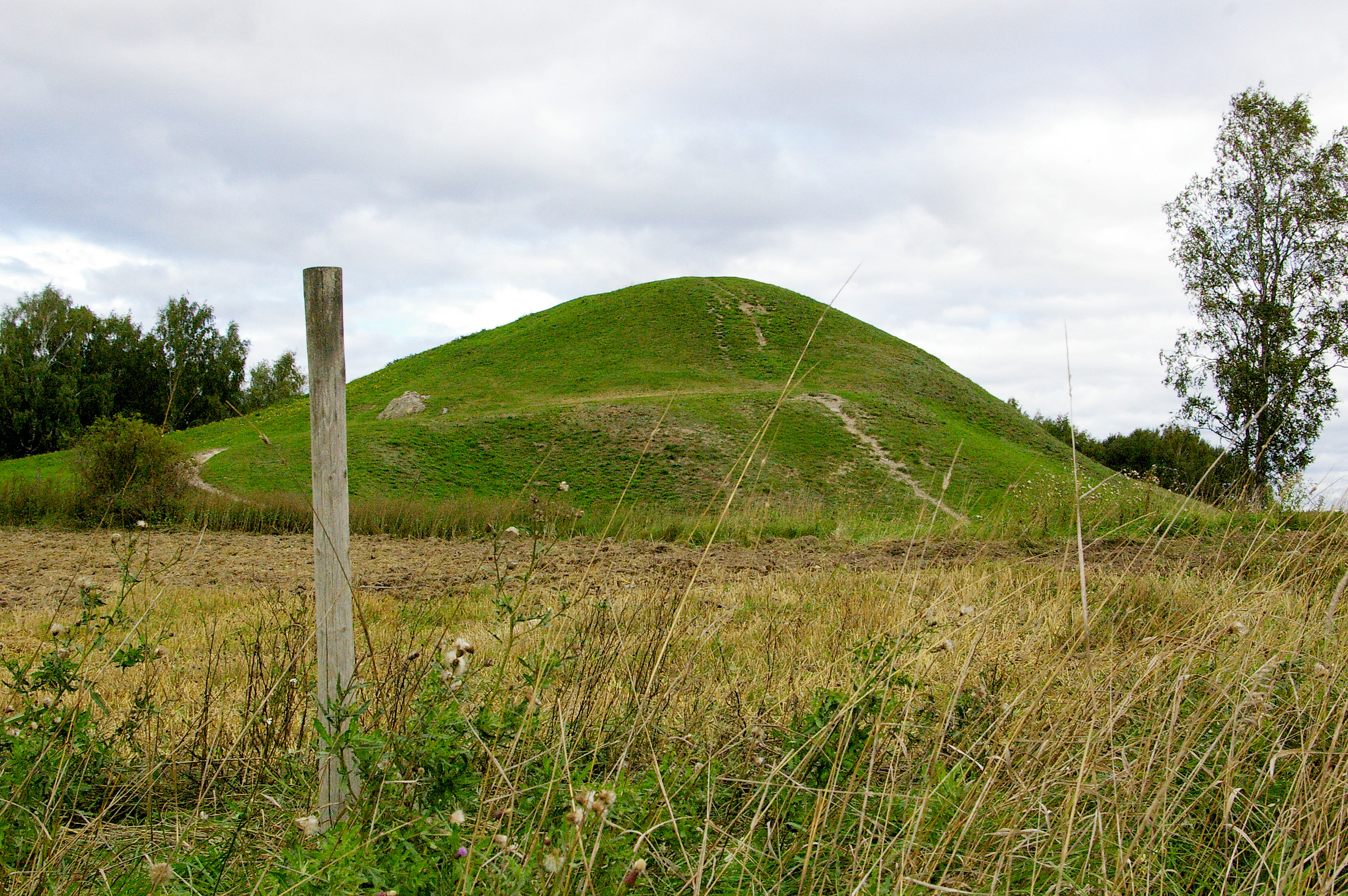 Ströbohög (Raä-nr Köping 56:1), Västmanland, Sverige.